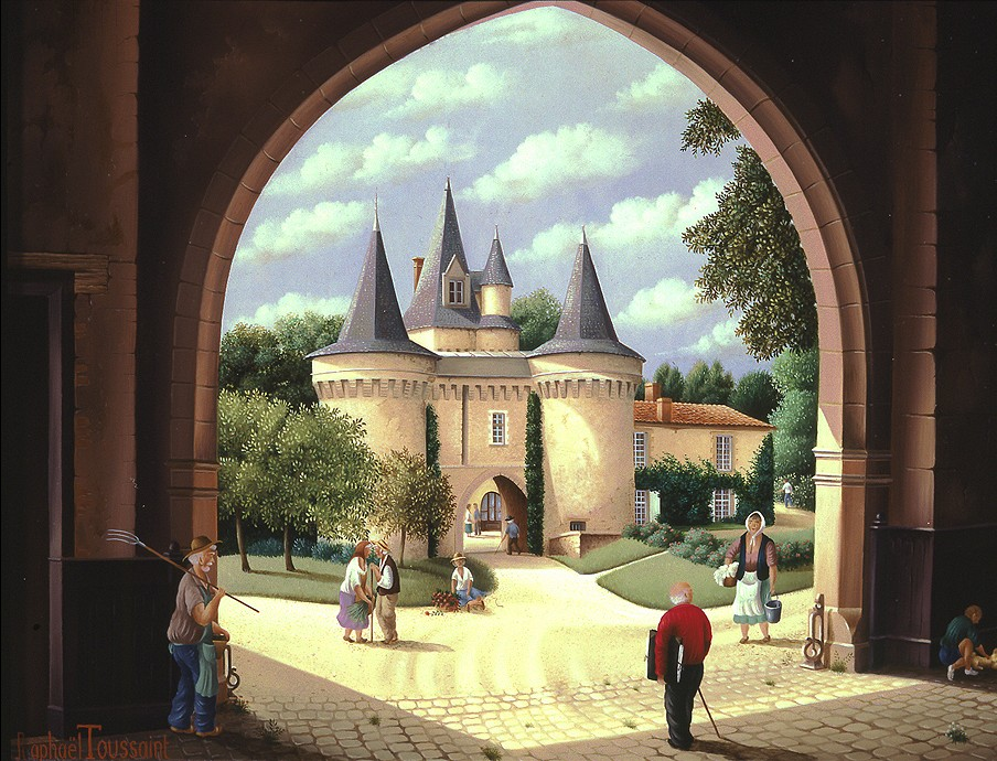 Le Château des roches Baritaud du peintre français Raphaël Toussaint. H.S.B 27x35 et datée 1994.